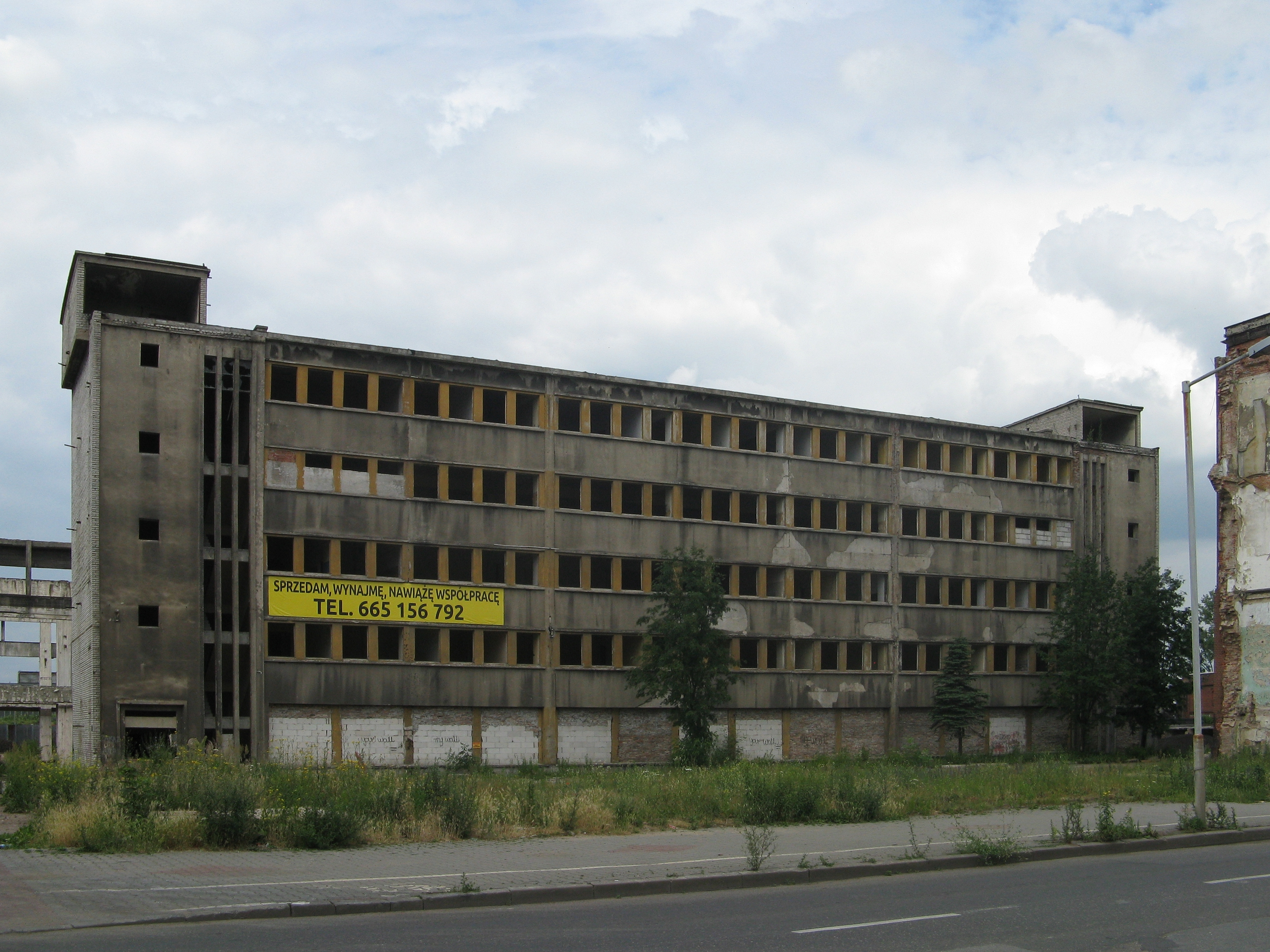 Pozostałości budynku ZUT Zgoda w Świętochłowicach-Zgodzie, ul. Wojska Polskiego.